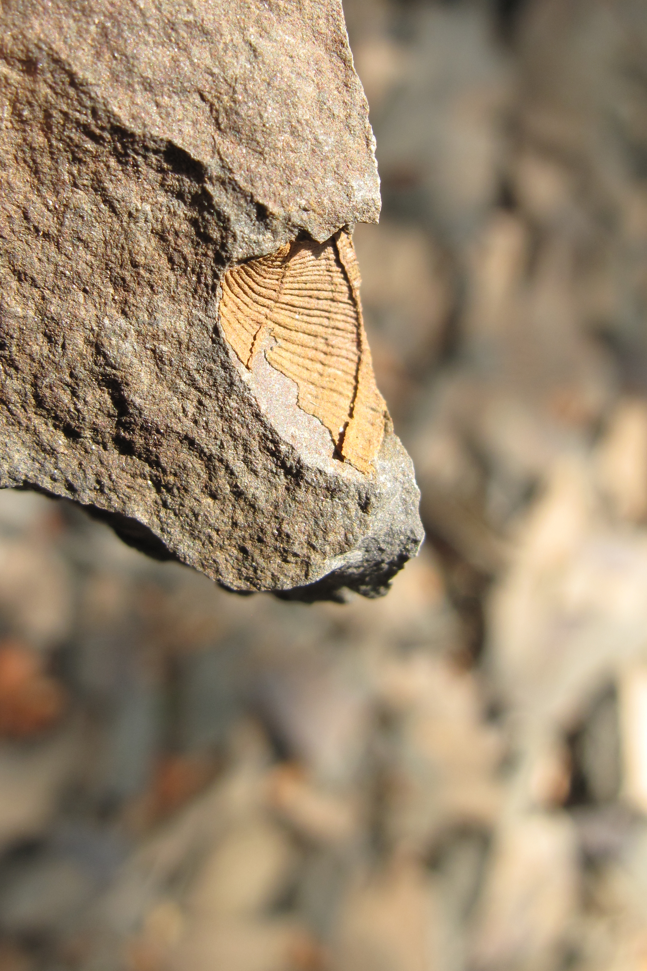 Detail zkameněliny v přírodní památce Biskoupky. Okres Rokycany, Česká republika.